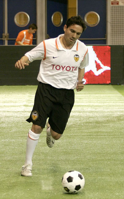 El futbolista internacional Juan Sánchez en un partido de la liga indoor con el Valencia C. F.